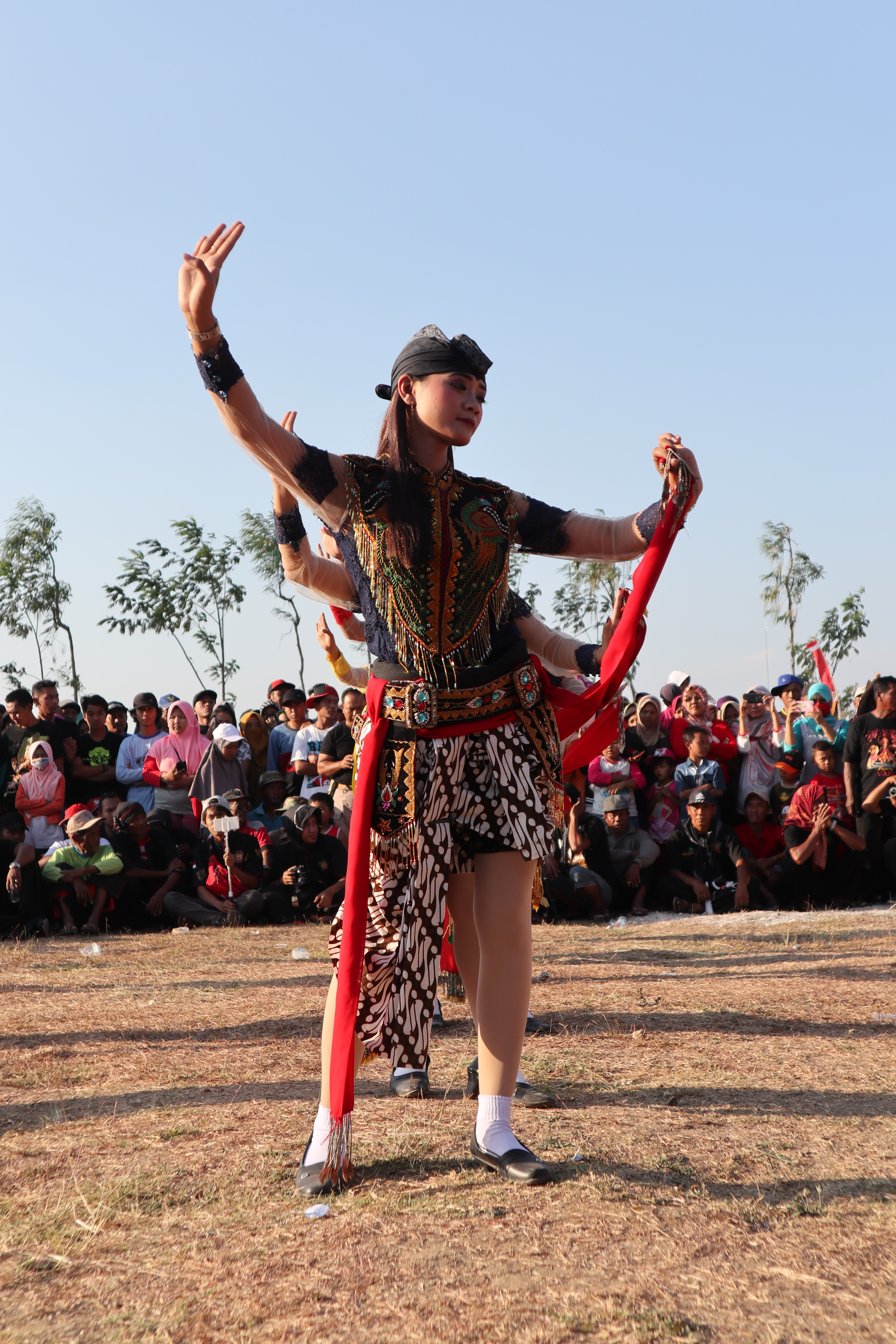 Jathil dahulu dimainkan oleh seorang laki laki. namun seiring berjalannya waktu. saat ini penari jathil diganti menjadi perempuan. penari jathill biasanya lebih dari satu untuk meramaikan pertunjukan reog ponorogo